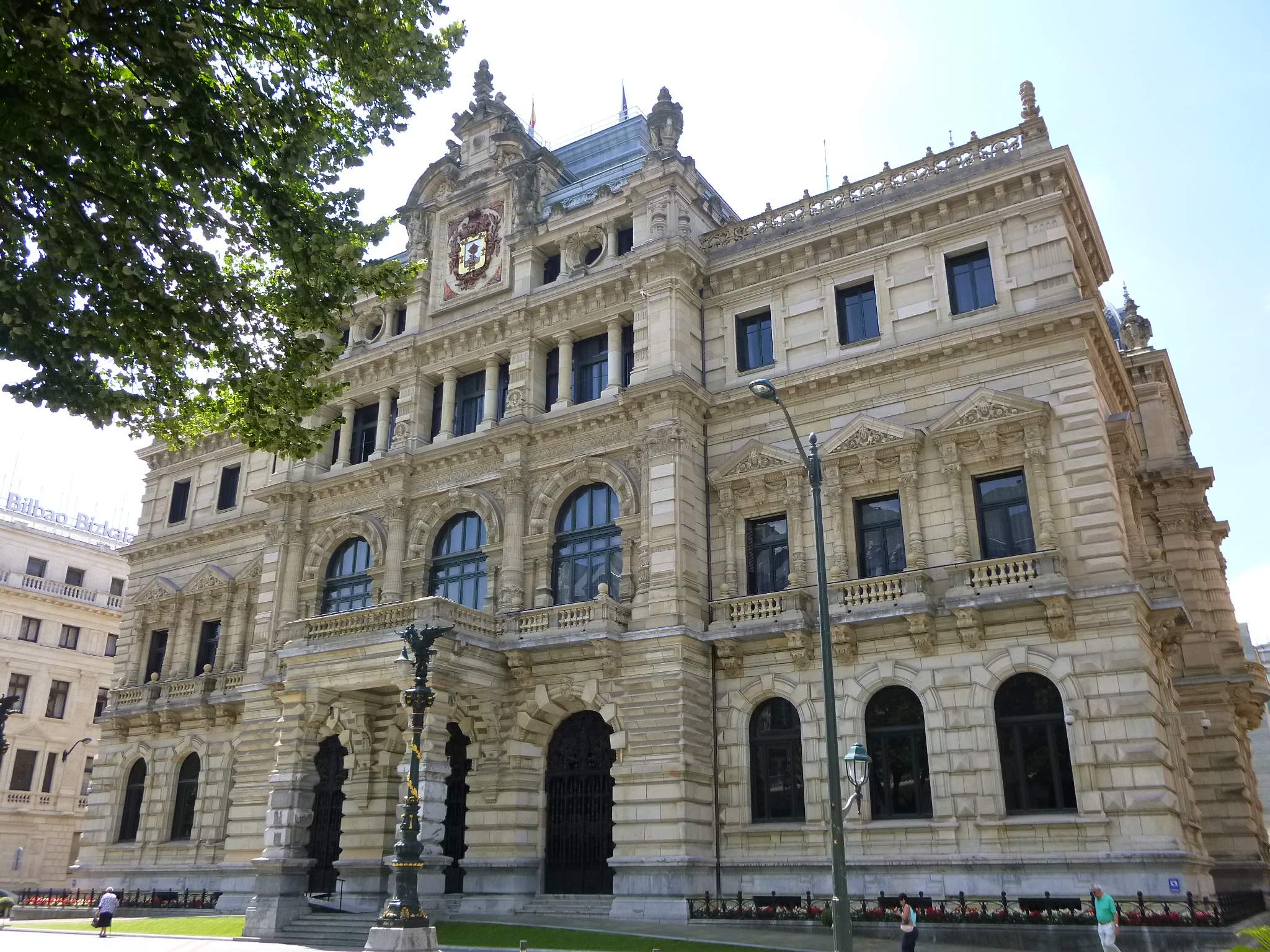 Diputación Foral de Bizkaia (Bilbao)